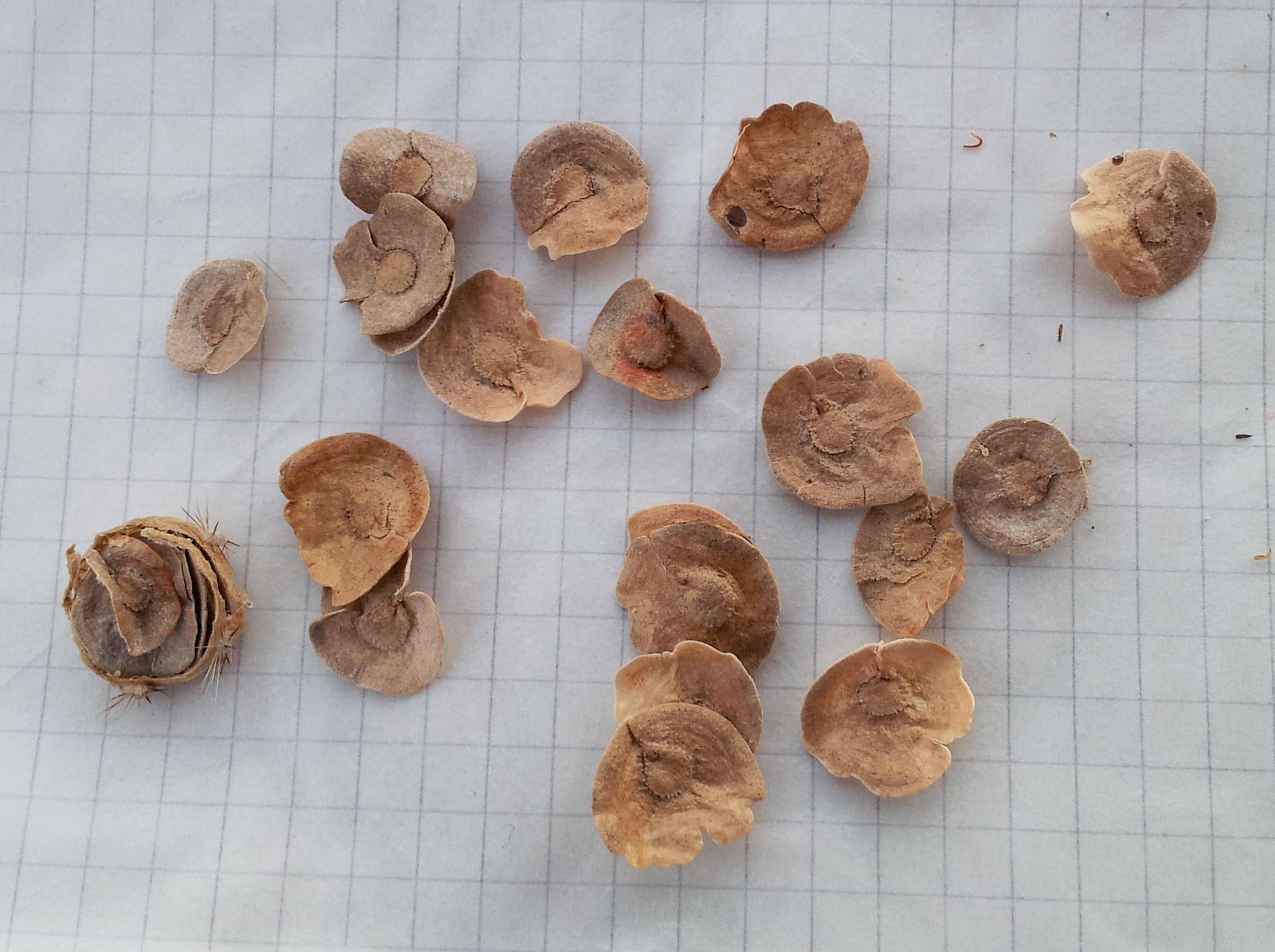 Samen von Pterocactus spec.